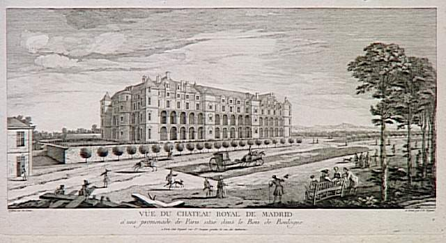 Château de Madrid, Bois de Boulogne, Paris